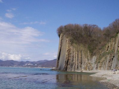 Скала Киселёва в Туапсинсокм районе Краснодарского края. Вид с юго-востока.